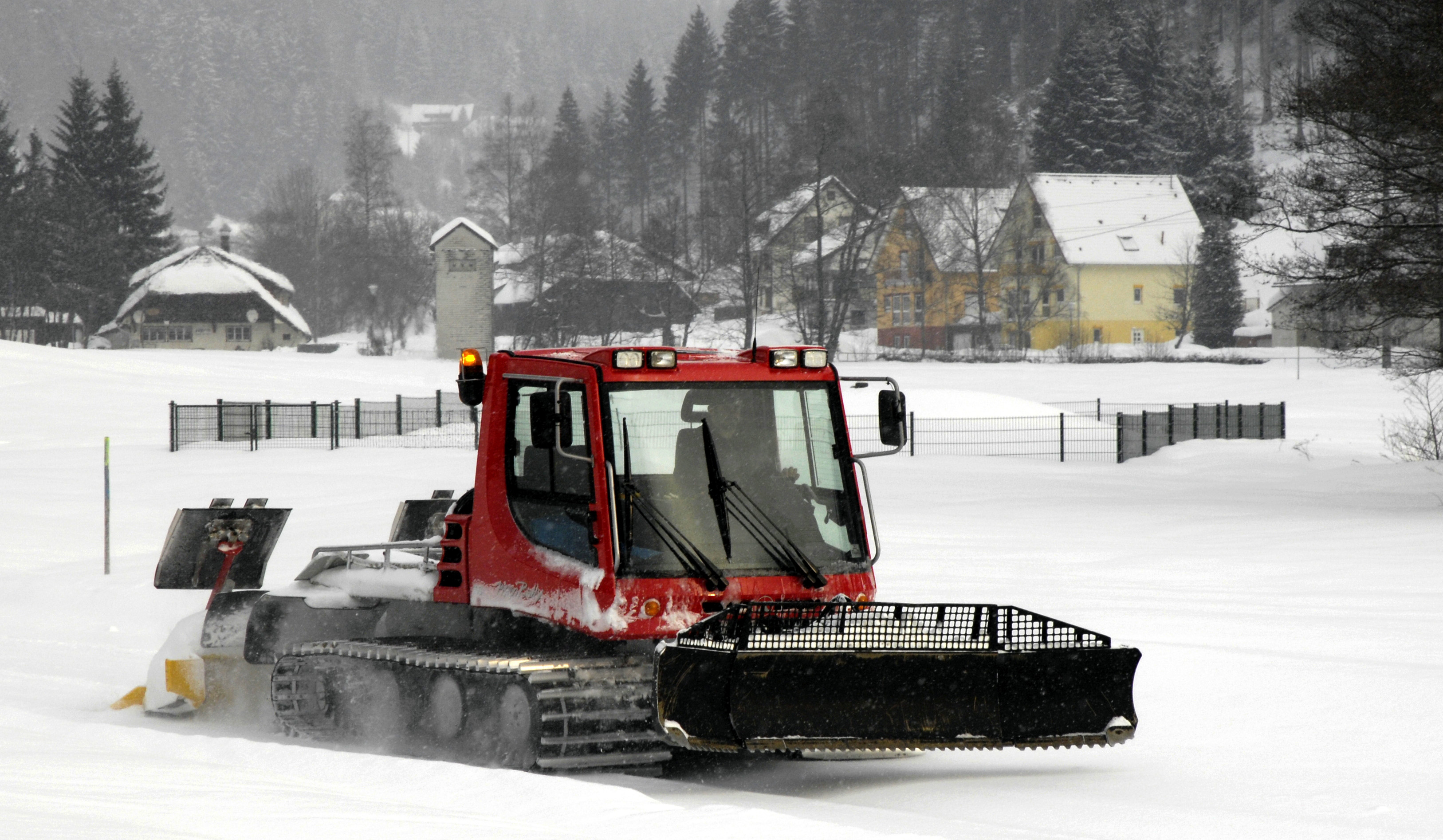 In Todtmoos wird die Ortsloipe gespurt